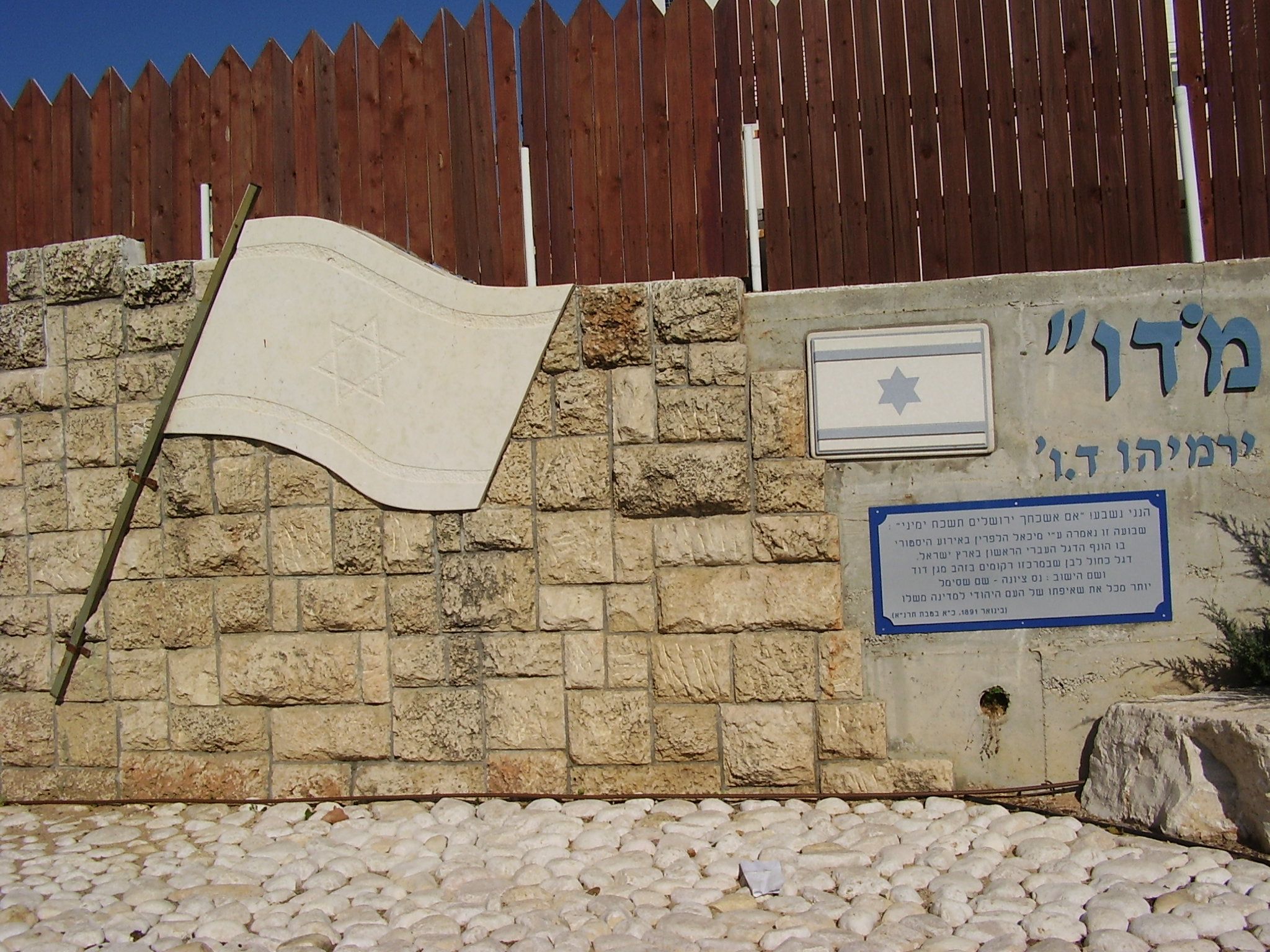 "אתר הנפת הדגל" בנס ציונה רישיון נוצר על ידי משתמש:Avi1111